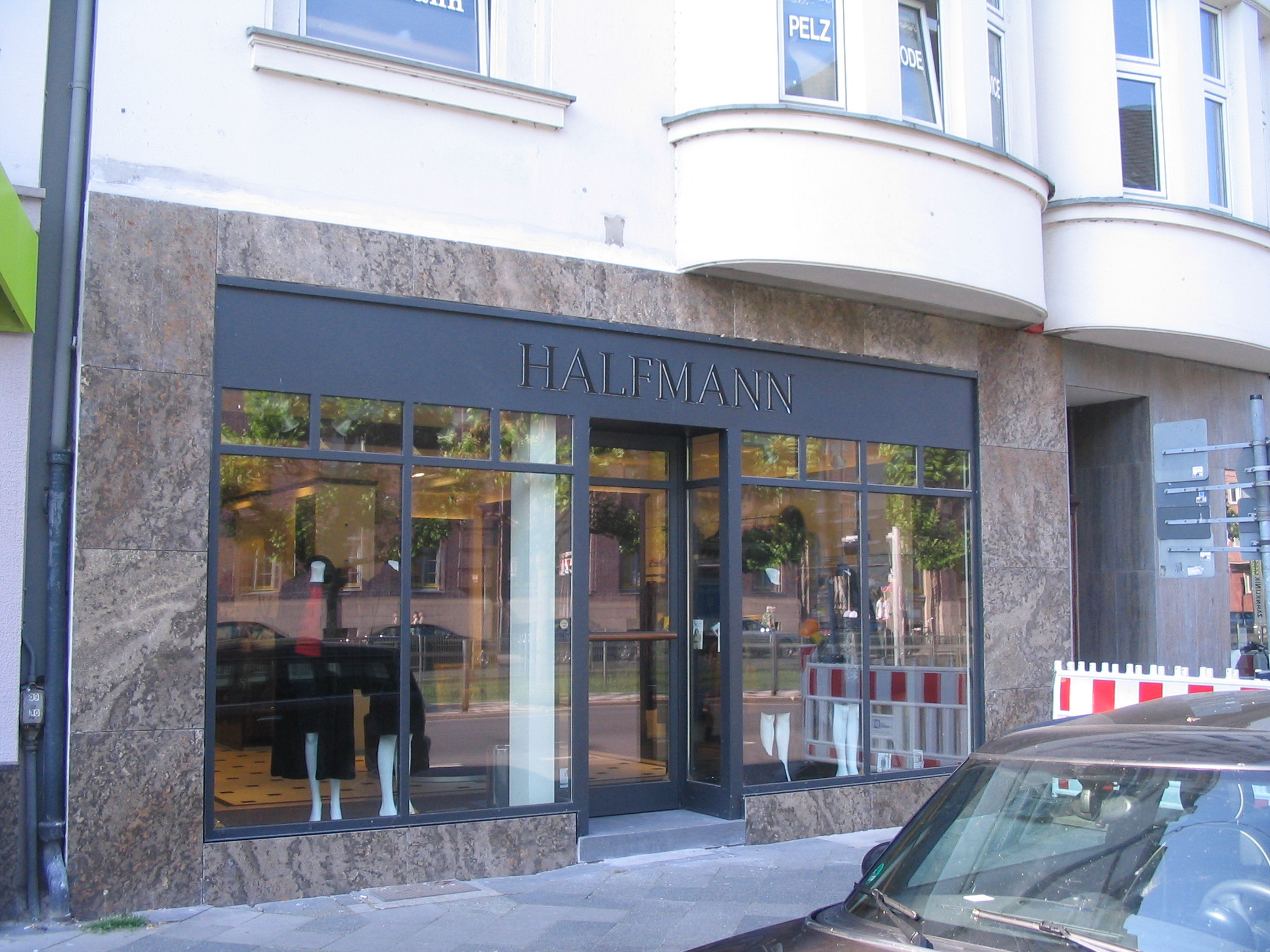 Halfmann Pelzmanufaktur, Kürschnerei auf der Luegallee 49, Düsseldorf-Oberkassel. 2013 nach der Erneuerung der Ladenfassade. Inhaber: Kürschnermeister Guido Halfmann